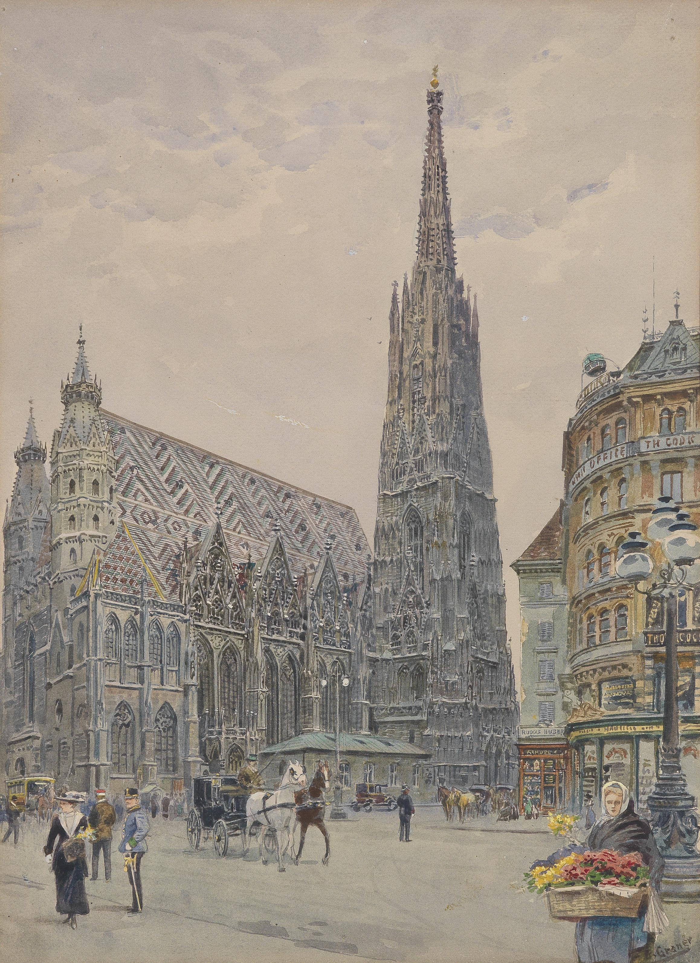 Stephansdom